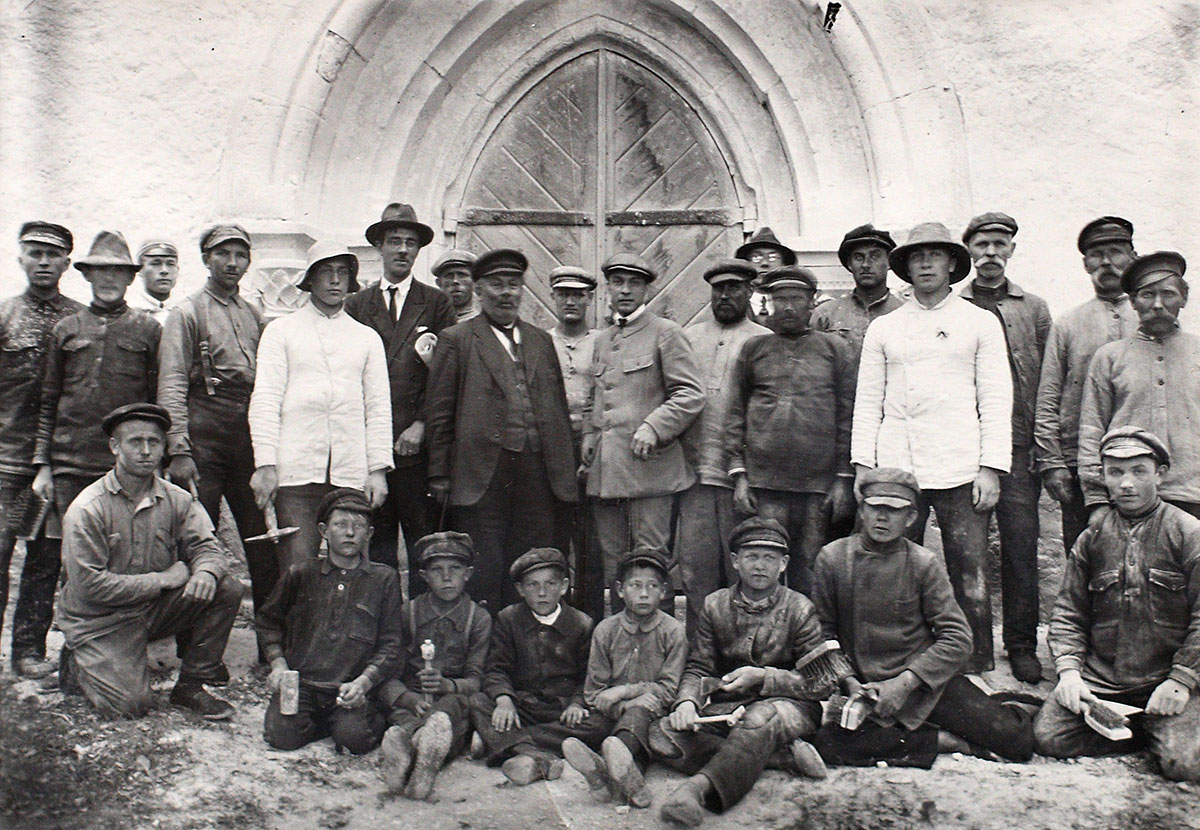 Saaremaa Karja Katariina ja Nikolause kiriku restaureerimises osalejad. Seisavad vasakult 6. insener Nikolai Paulsen, 8. Karja praost Karl Wöhrmann, 10. restaureerismitööd juht professor Helge Kjellin, 12. Voldemar Vaga (tagumises reas).